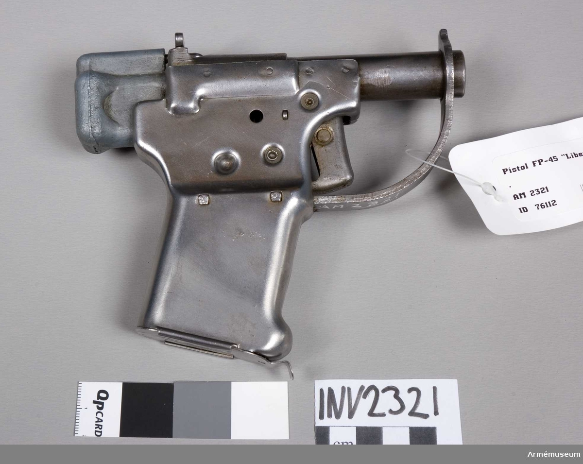 Enkelskotts med förvaring av tio patroner i utrymmet i kolven. Kaliber 45 (11,5 mm). Skjuter patron .45 ACP, lyspatron av samma typ samt en speciell "survival" round (hagelpatron) för jakt.